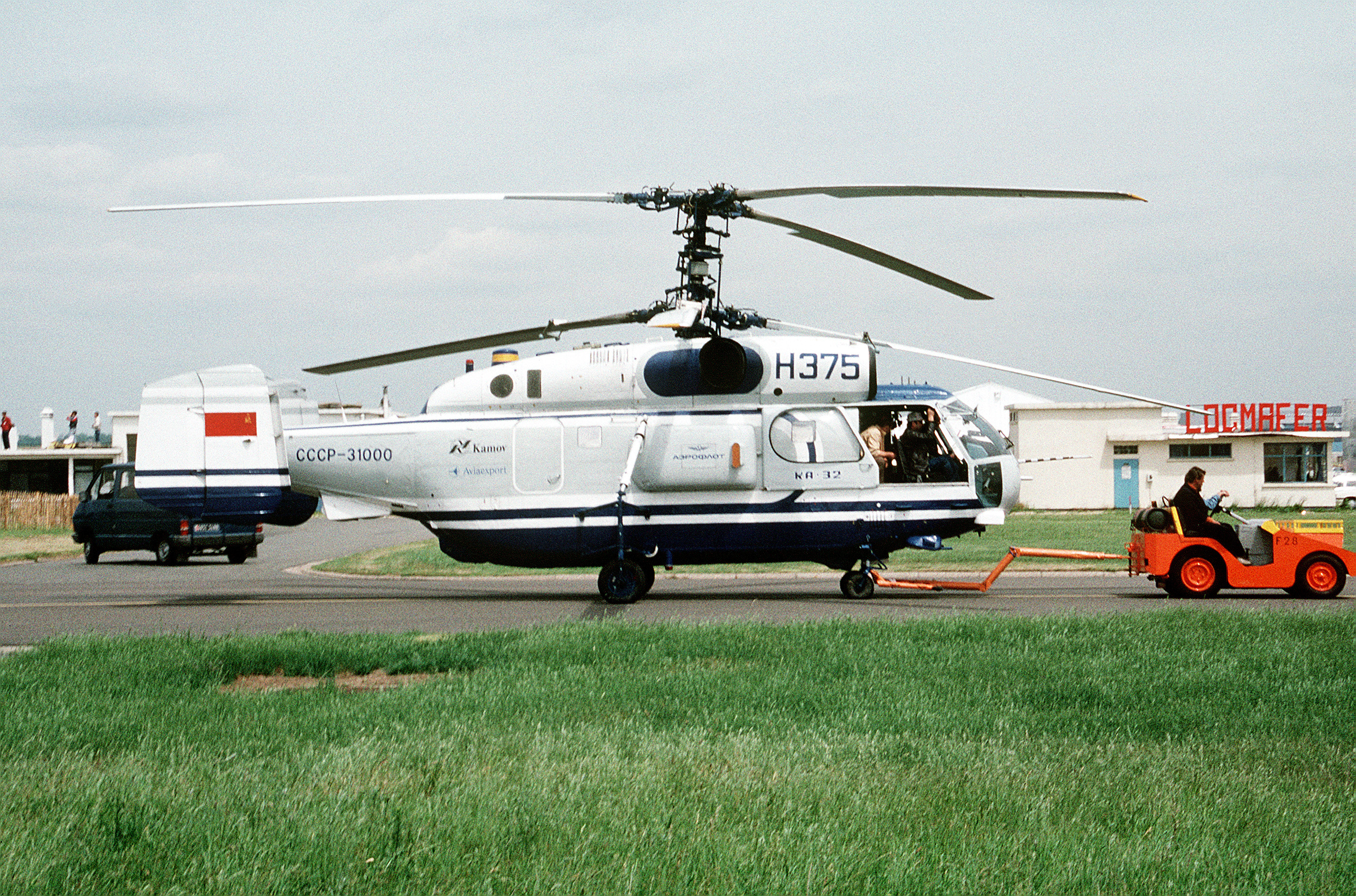 Kamov Ka-32T (Helix-C) auf der Pariser Luftfahrtschau im Juni 1991